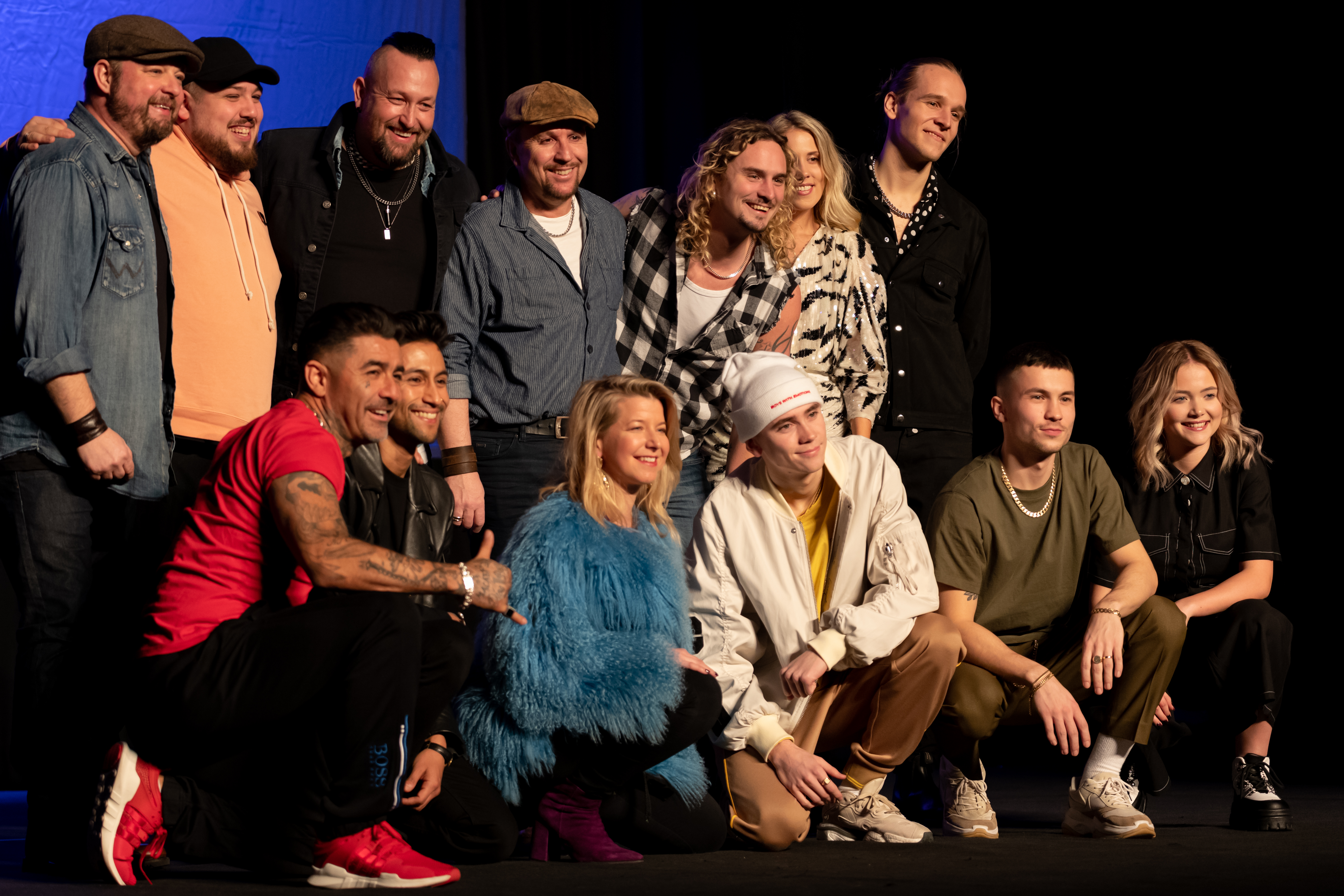 Alla tävlanden på pressträff inför andra chansen. Melodifestivalen 2020, Eskilstuna.